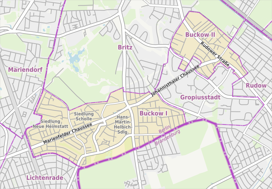 Übersichtskarte der Straßen und Ortslagen in Berlin-Buckow